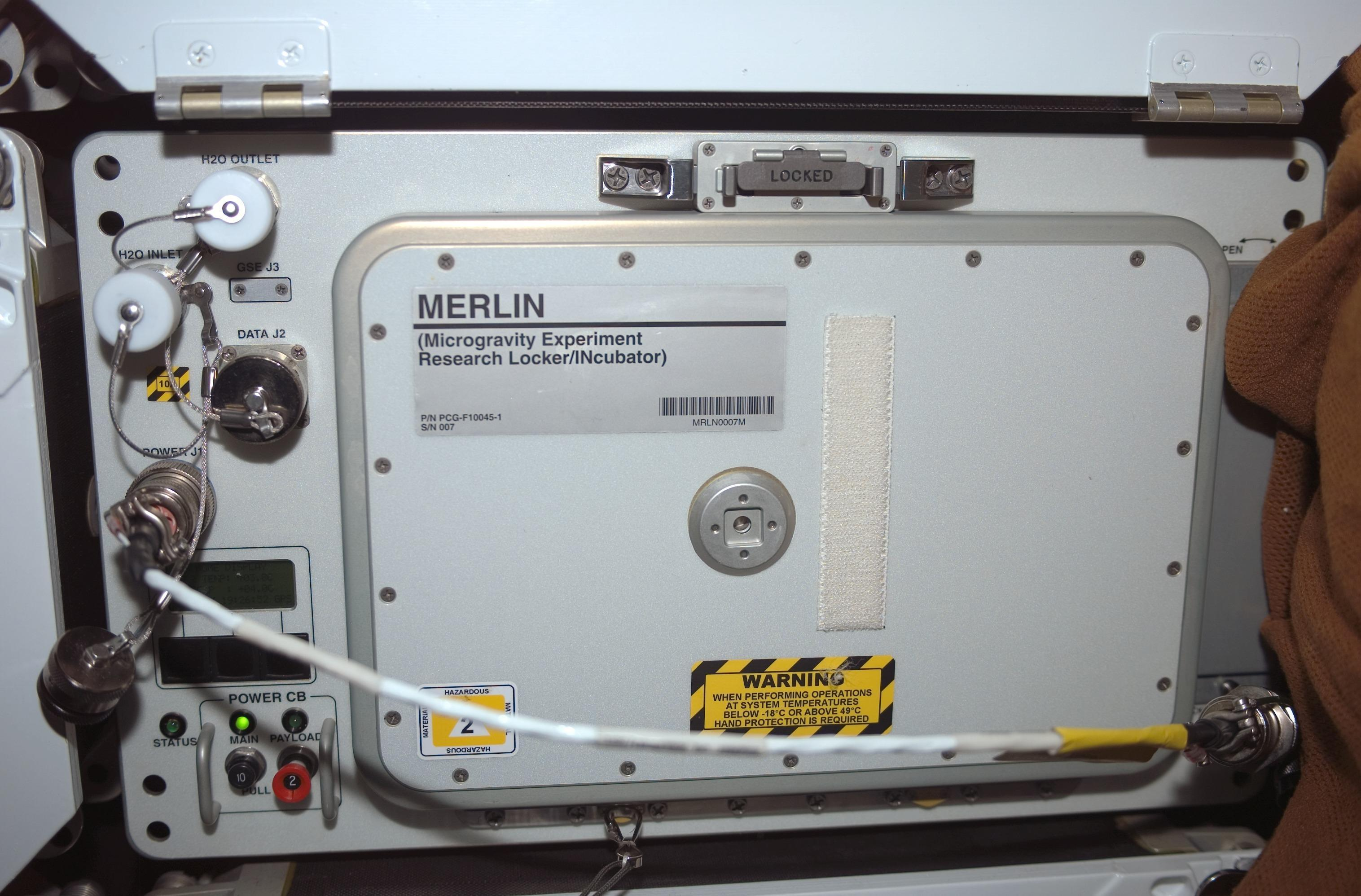 MERLIN Einheit bei STS Mission 123